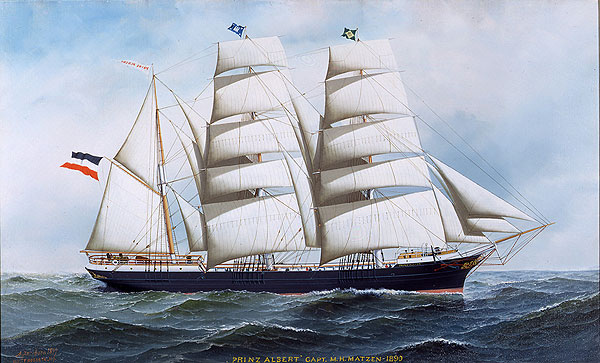 „Prinz Albert“, erbaut 1861 als Vollschiff bei R.M. Slomann & Co., Hamburg, Bau-Nr.: 64